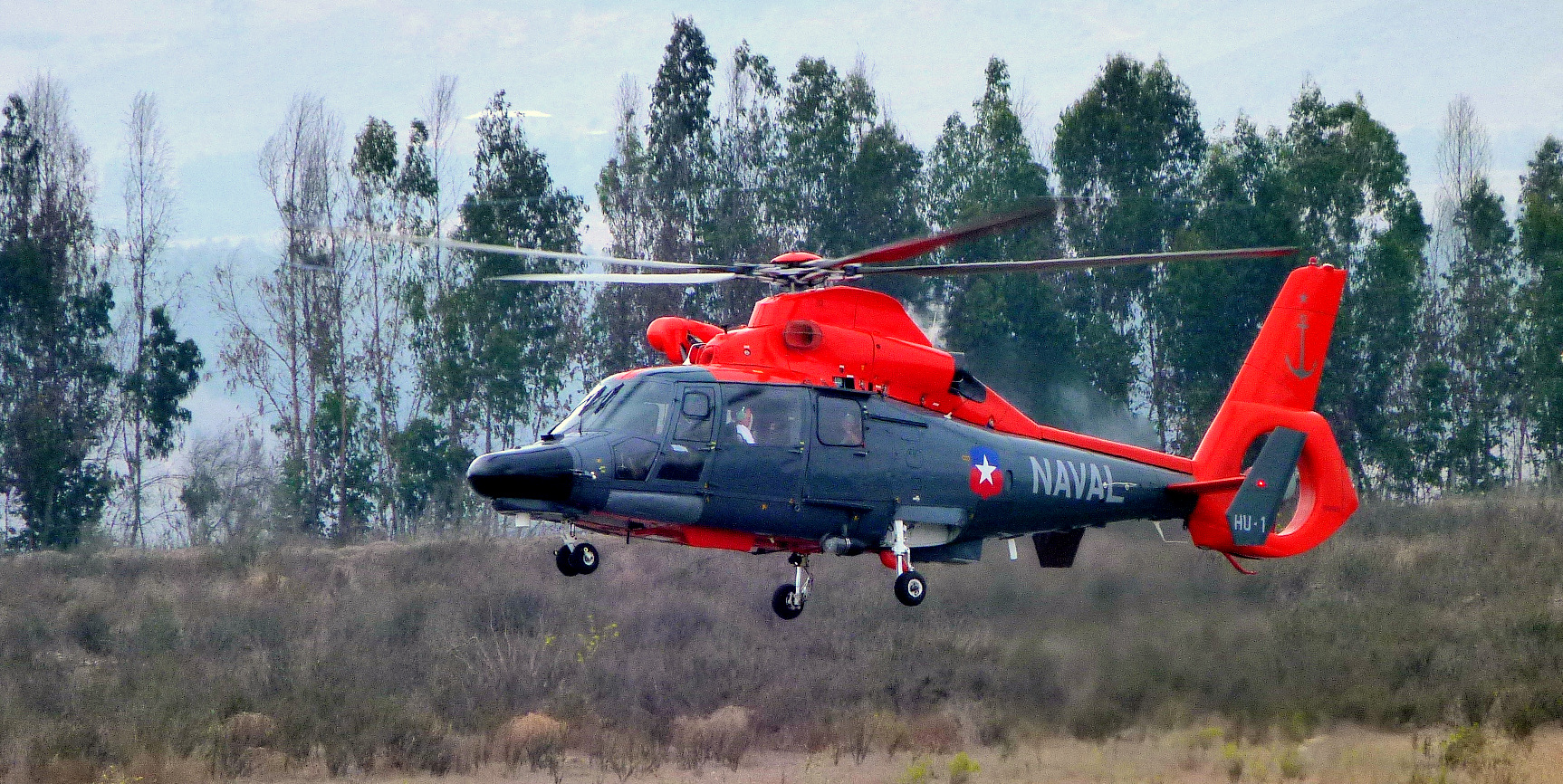 Aterrizando en el Aeródromo La Florida de La Serena - Chile.